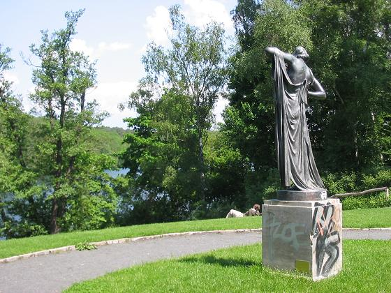 Paul-Ernst-Park am Schlachtensee, Berlin. Phryne von Ferdinand Lepcke